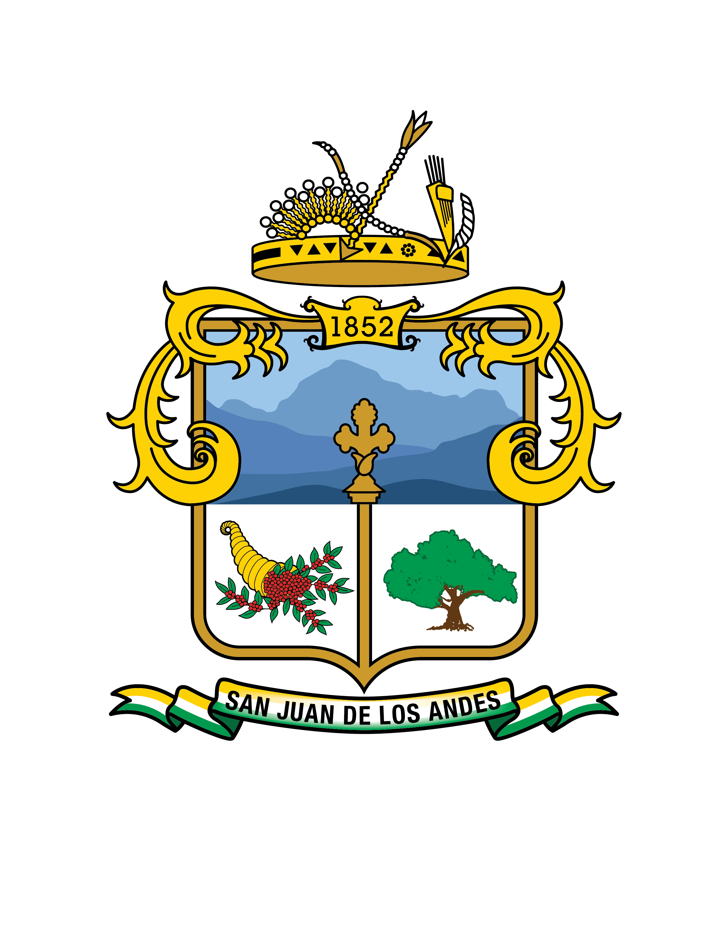 Escudo Oficial de Andes, Antioquia